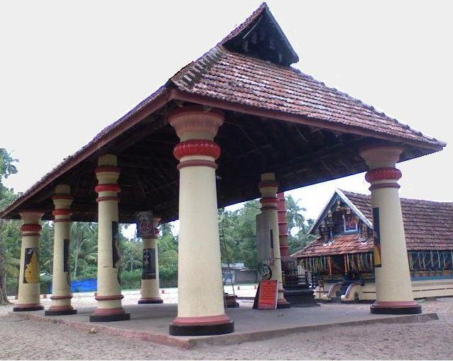 നാല്പത്തെണ്ണീശ്വരം-കിഴക്കേ ആനക്കൊട്ടിൽ